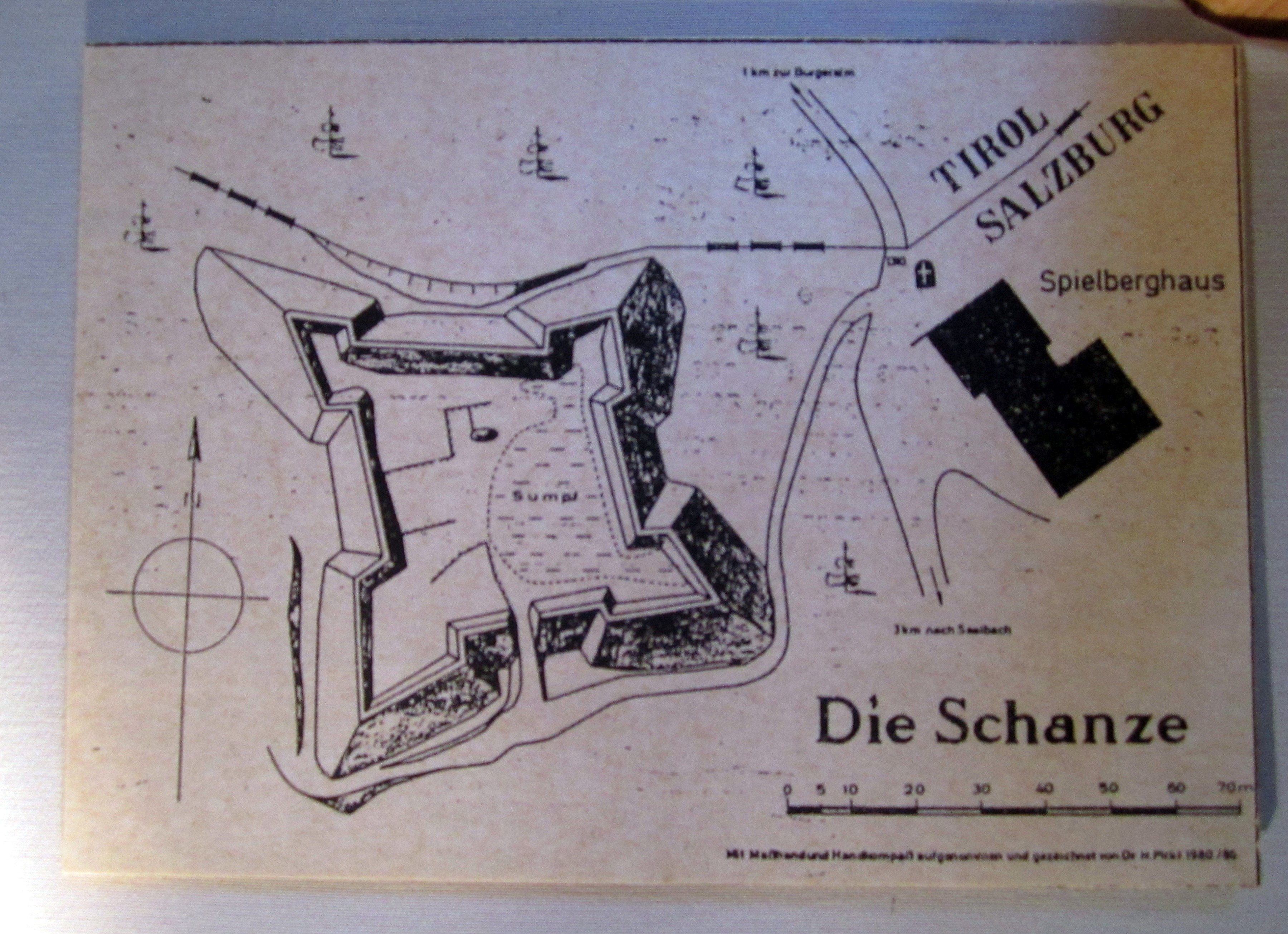 Darstellung der von dem Salzburger Dombaumeister Santino Solari errichteten Schanze am Grießenpaß im Bergbau- und Gotikmuseum Leogang. Leogang, Land Salzburg, Österreich.